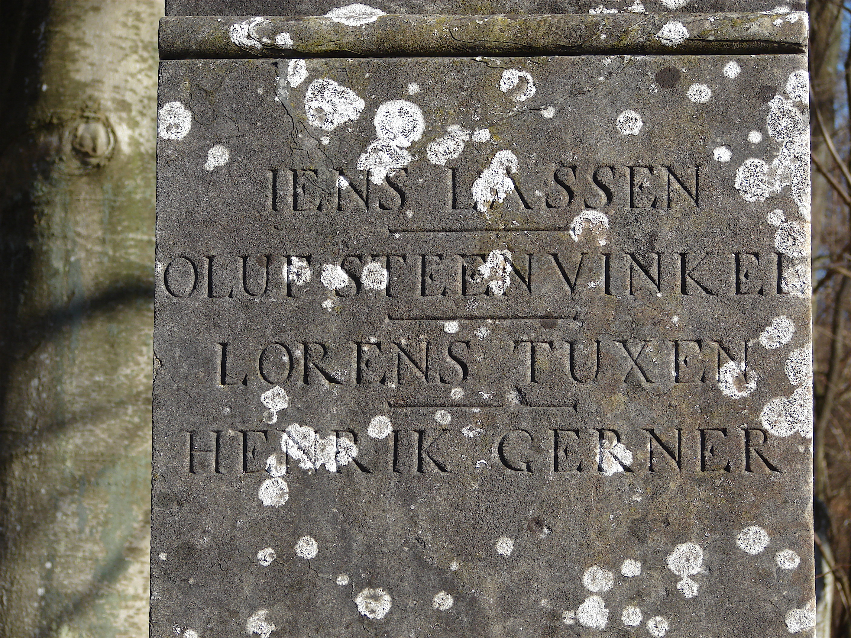 Detalje av mindestøtte over Iens Lassen, Oluf Steenvinkel, Lorens Tuxen, Henrik Gerner, udført af Johannes Wiedewelt, 1780'erne, Jægerspris, Sjælland